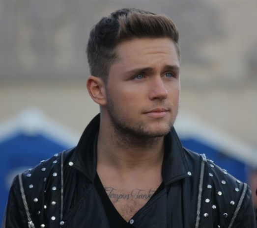 Влад Соколовский в лужниках Есть исходник